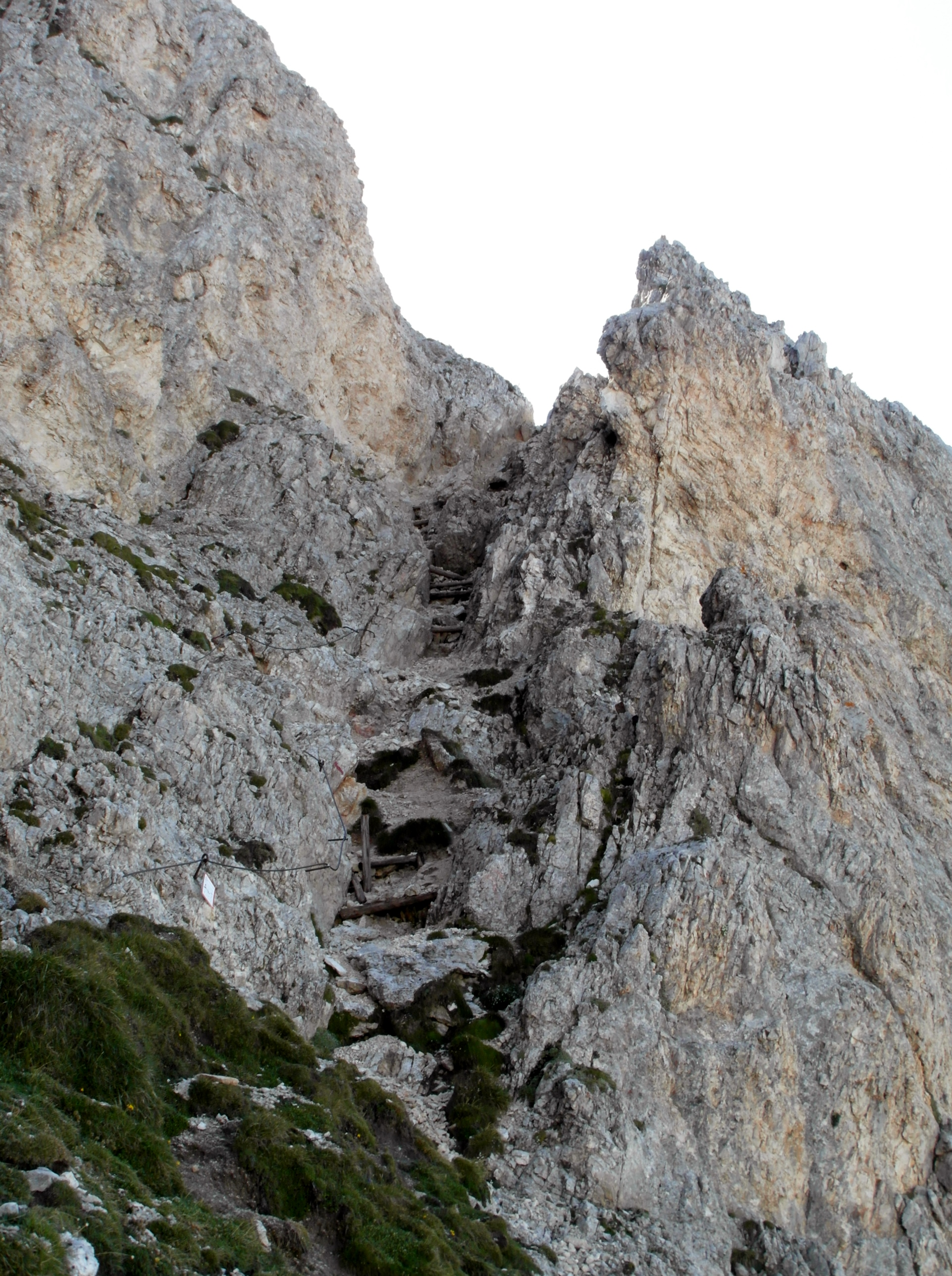 Sentiero attrezzato Günther Messner